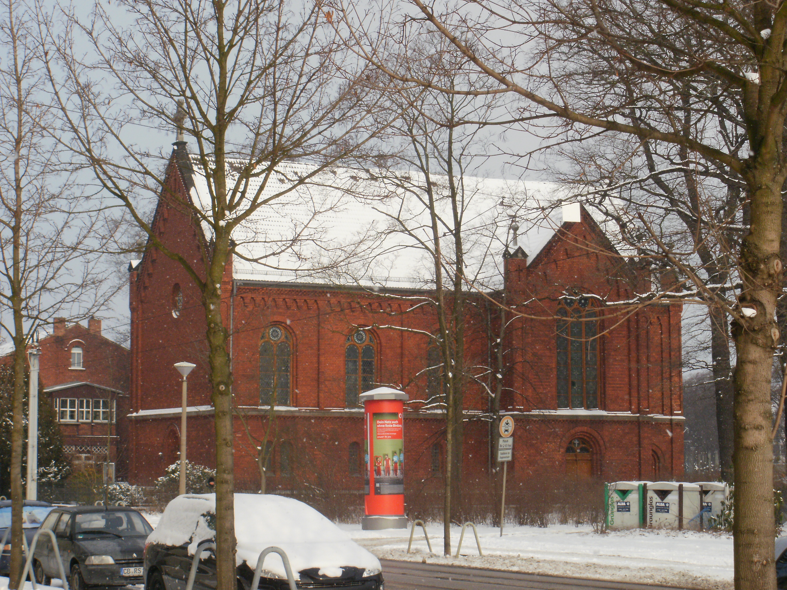 Kreuzkirche der Selbstständigen Evangelisch-Lutherischen Kirche, Karlstraße 82, Cottbus